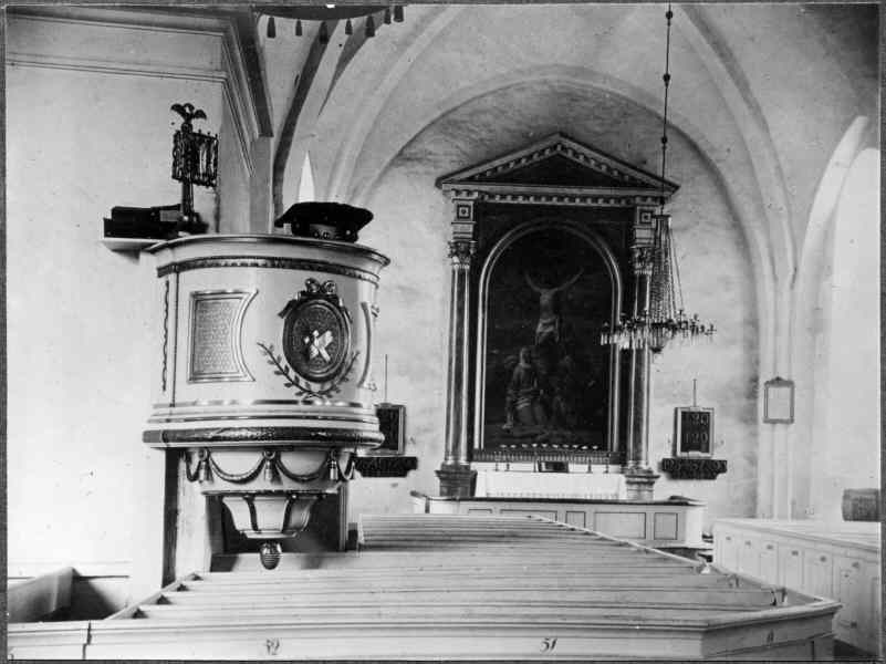 Interiör mot öster. Kategori: (02) Interiörer Interiör mot öster.